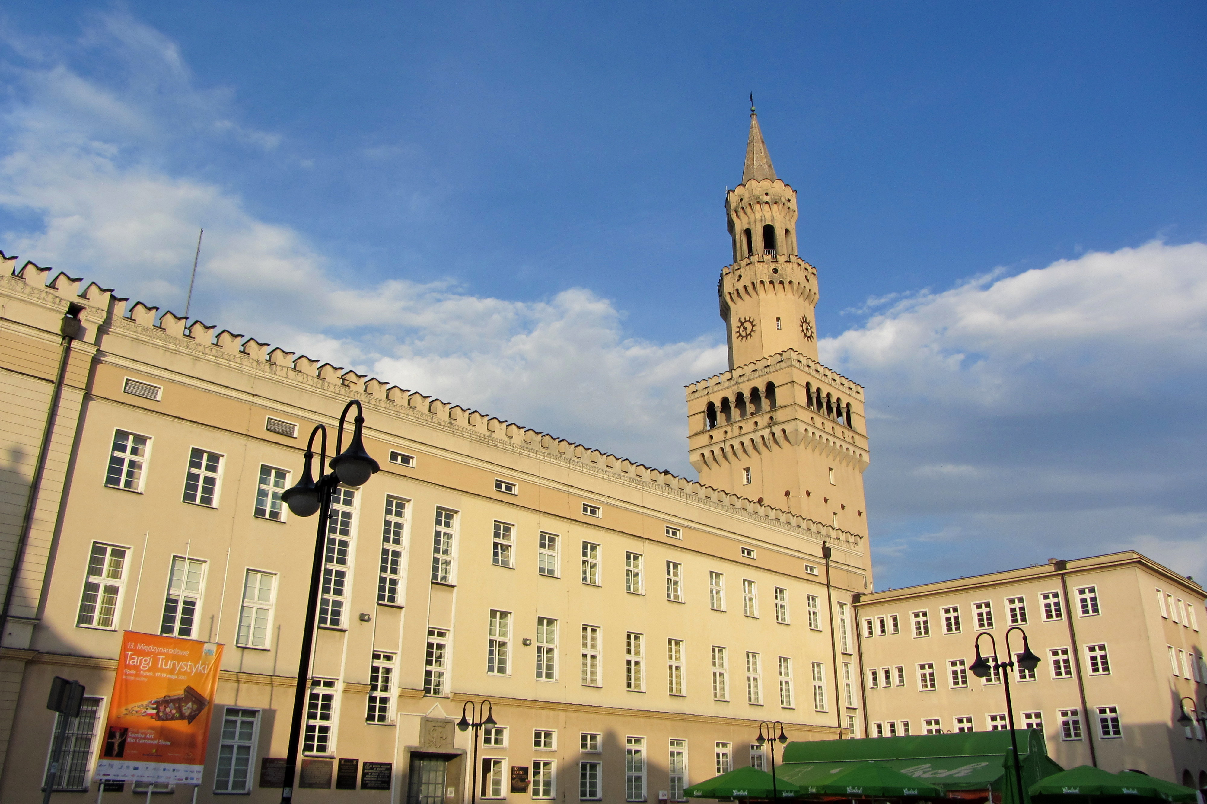 Das Oppelner Rathaus.